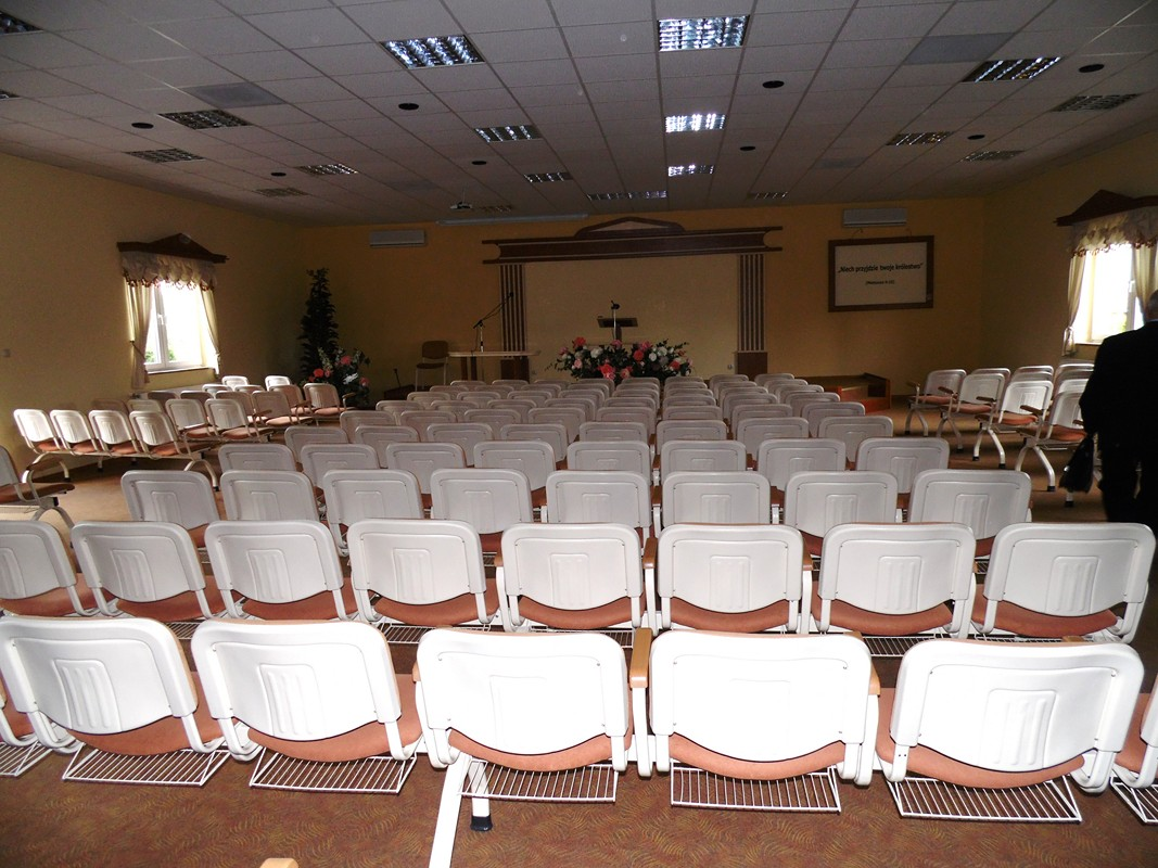 SALA KRÓLESTWA ŚWIADKÓW JEHOWY.